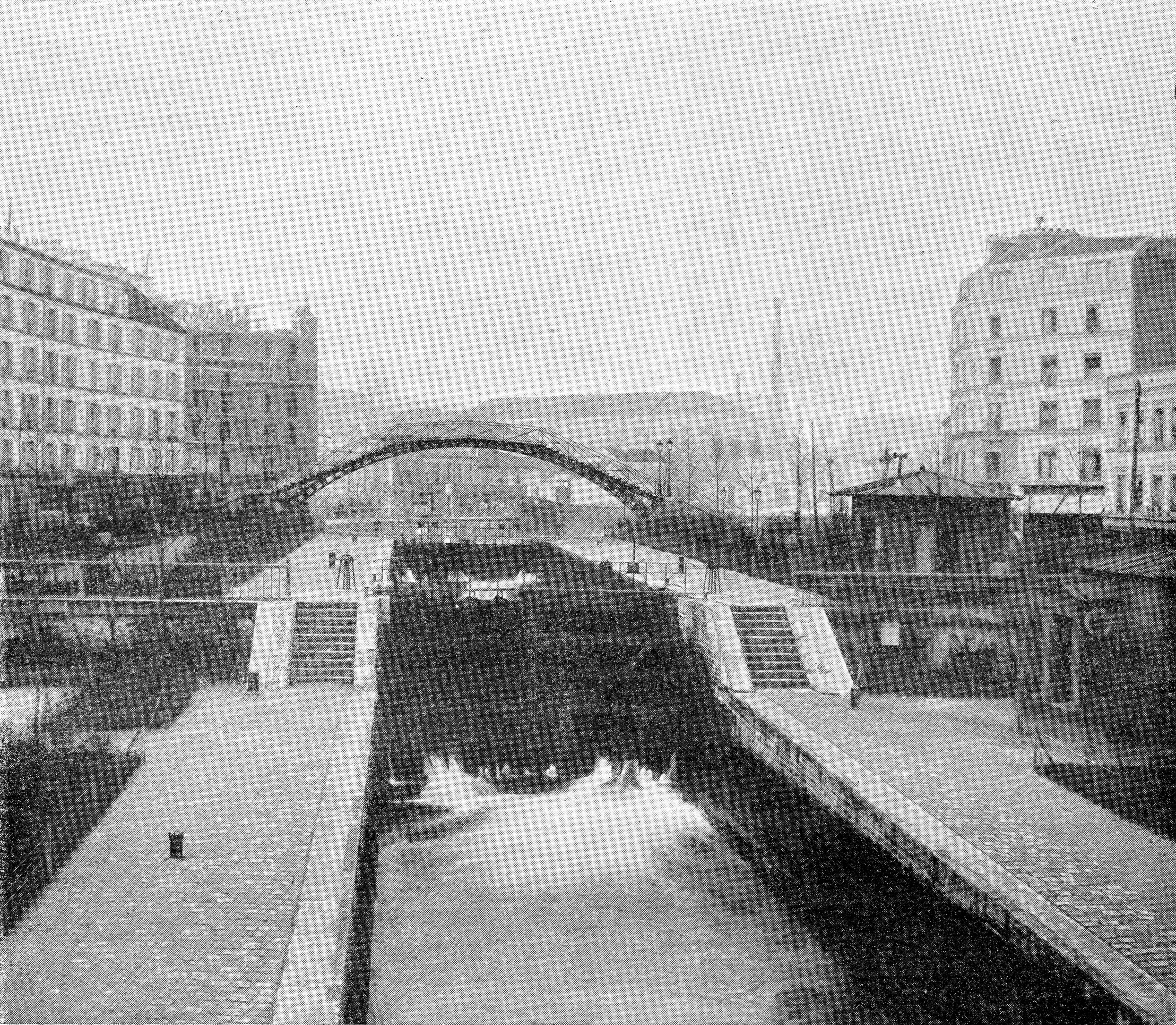 Clément Maurice Paris en plein air, BUC, 1897,Canal Saint-Martin , écluse de la rue Grange-aux-Belles